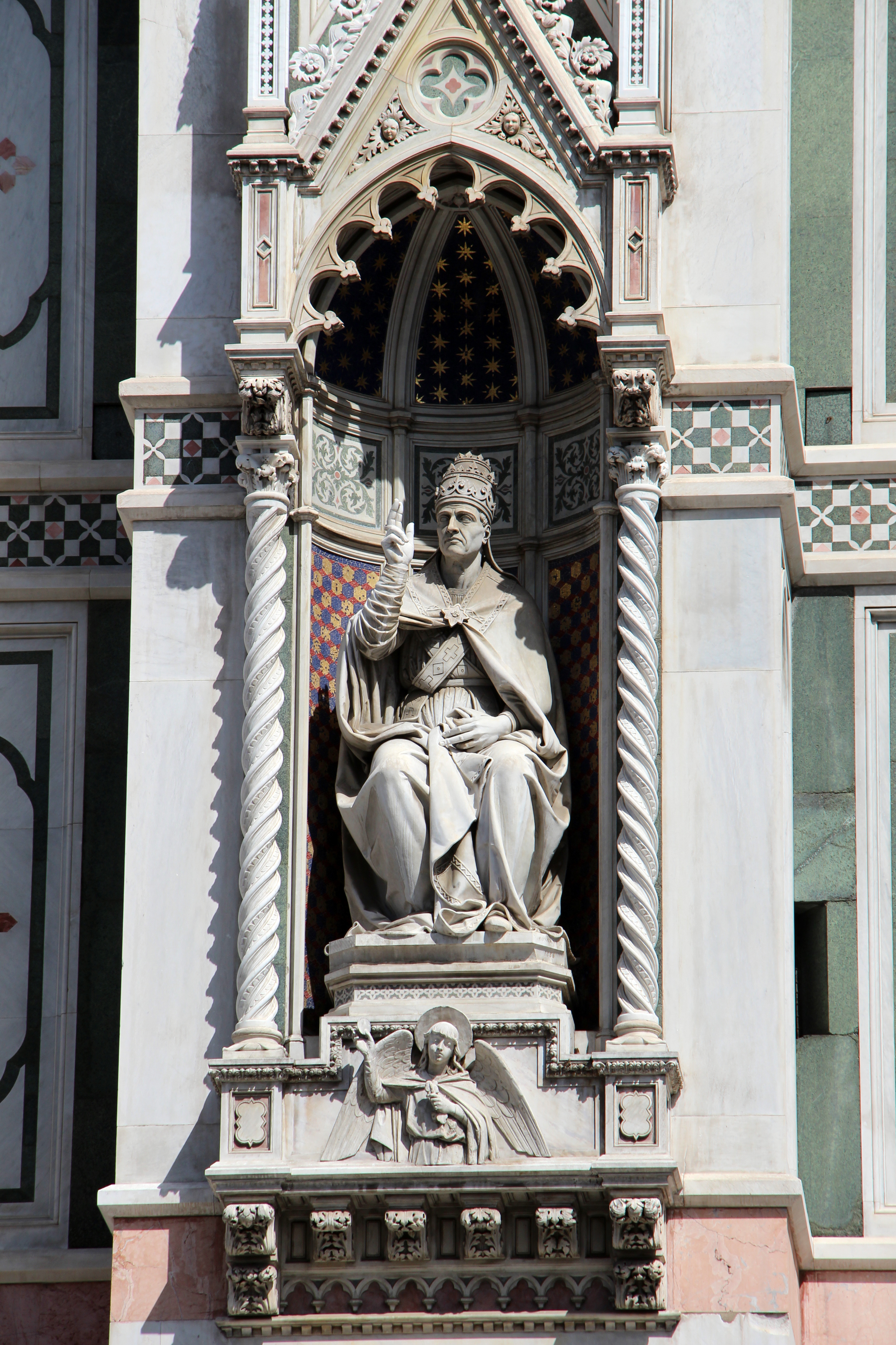 Firenze, vedi nome file